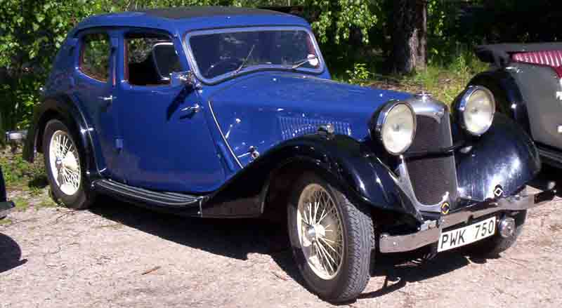 Riley 12/4 Kestrel Saloon 1935